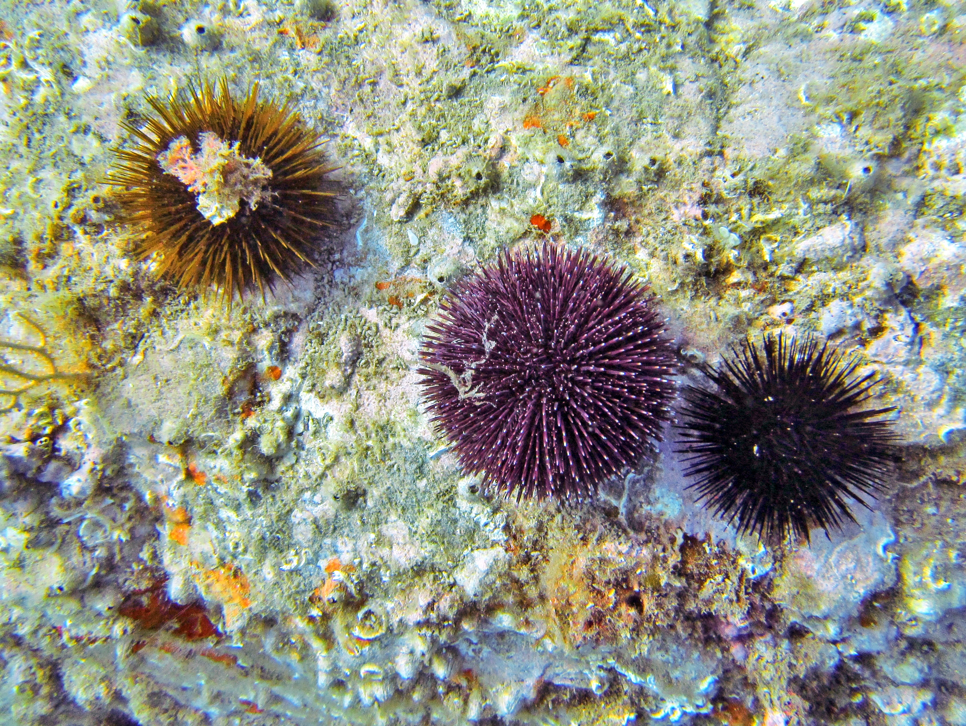 Les trois principales espèces d'oursins de Méditerranée : dans l'ordre de gauche à droite, l'oursin comestible (Paracentrotus lividus), l'oursin granuleux (Sphaerechinus granularis), et l'oursin noir (Arbacia lixula).